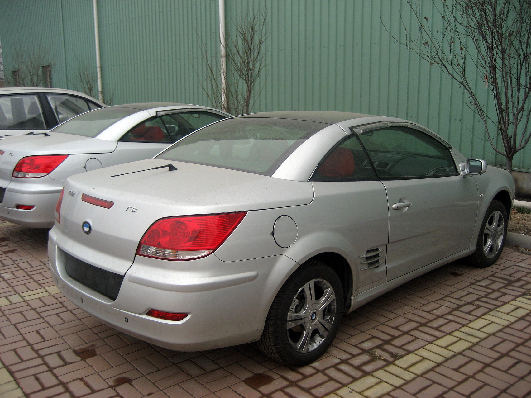 BYD F8 (tail)